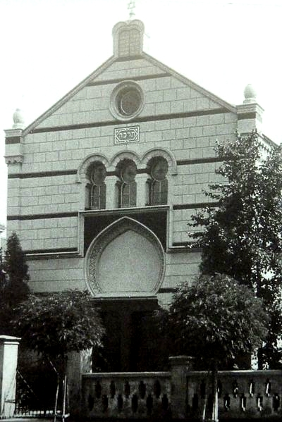 ehemalige Synagoge Remagen, Ecke Grabenstraße/An der Stadtmauer, 1905